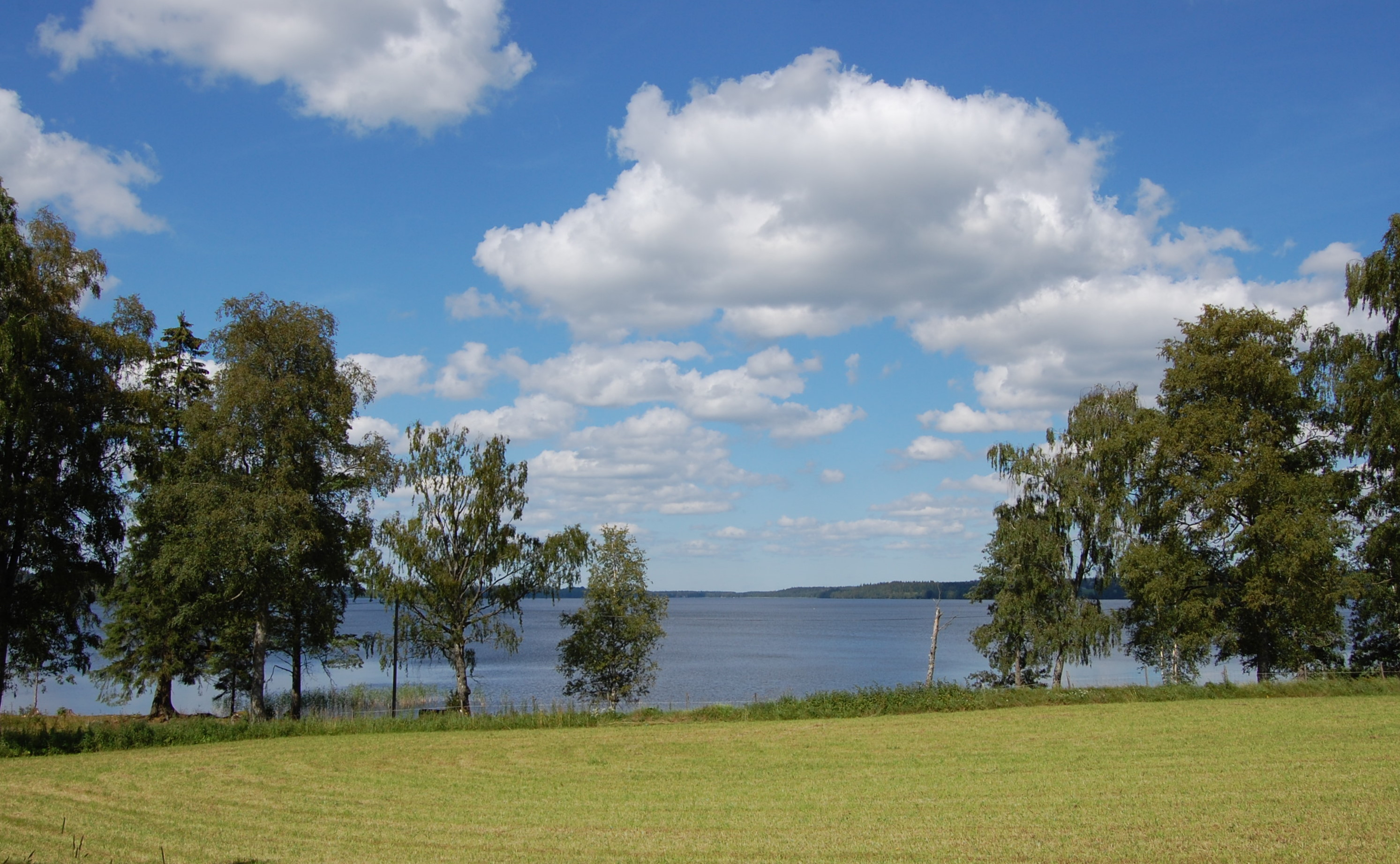 Südufer des Vallsjön